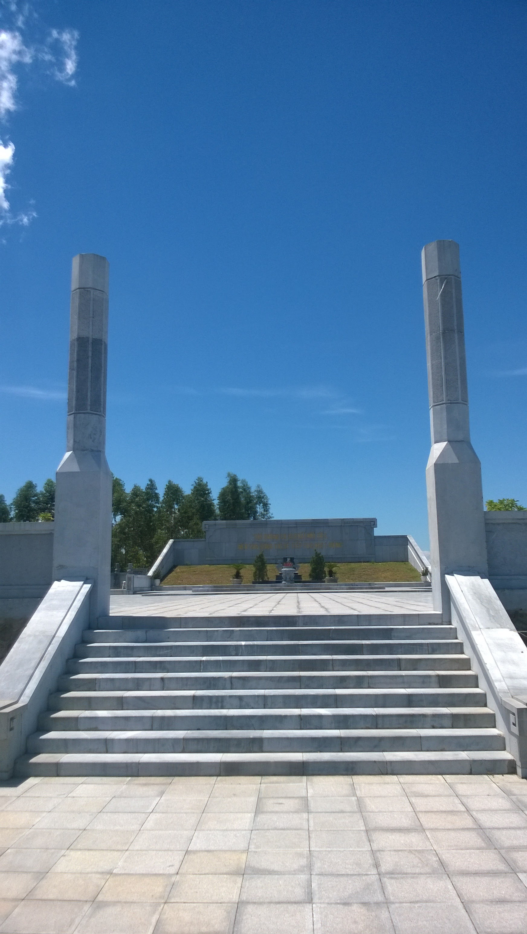 Lăng mộ Hà Huy Tập